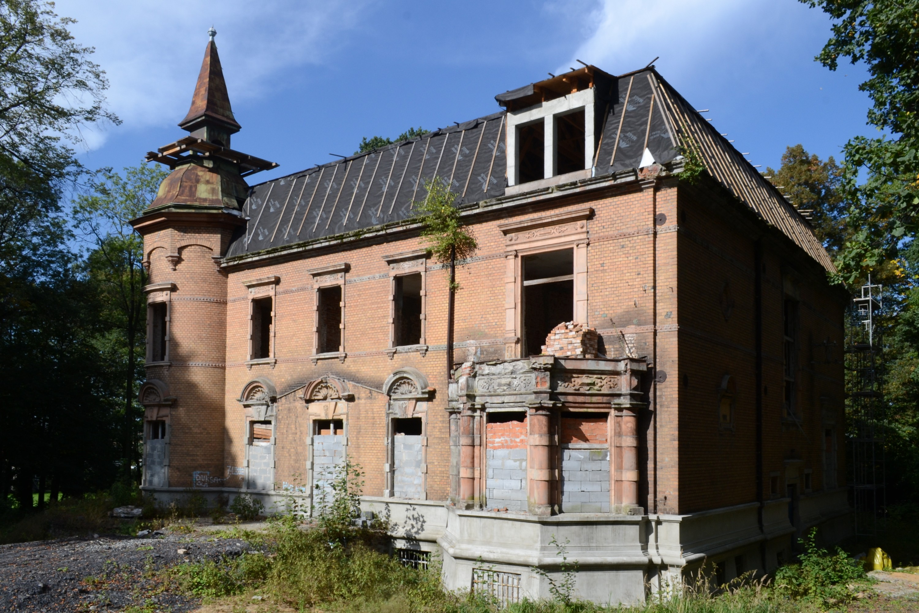 Rzuchów, ul. Rybnicka 66 - park krajobrazowy wraz z dworem